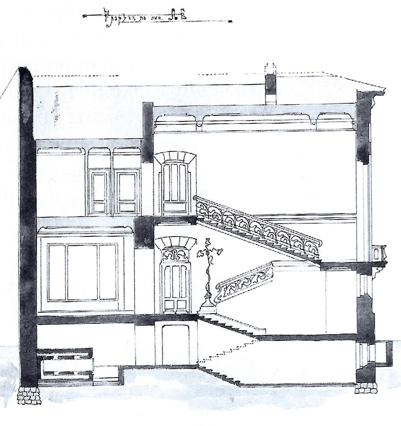 Разрез особняка О. А. Листа в Глазовском переулке, автор Л. Н. Кекушев